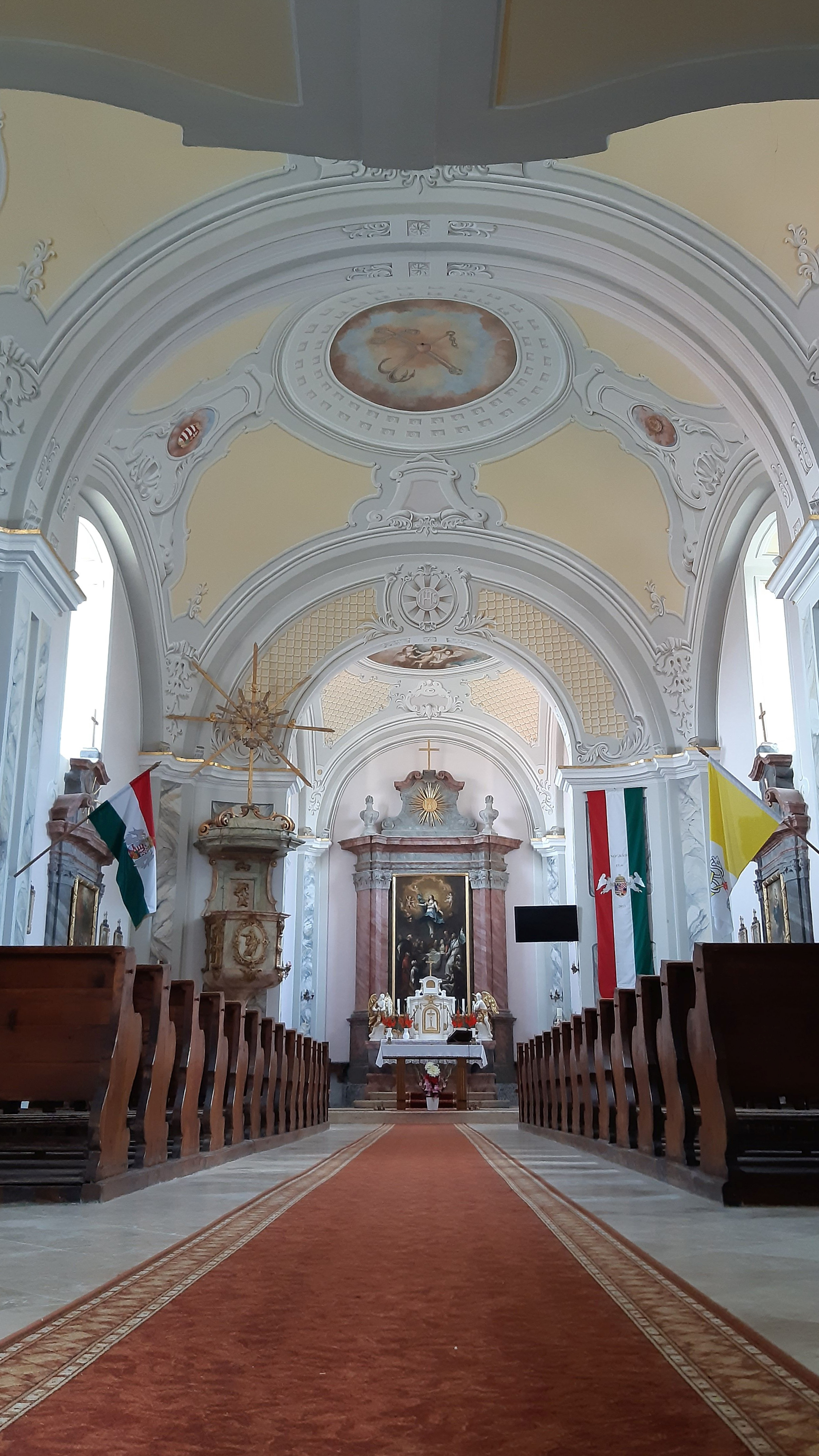 A nógrádi római katolikus templom belülről